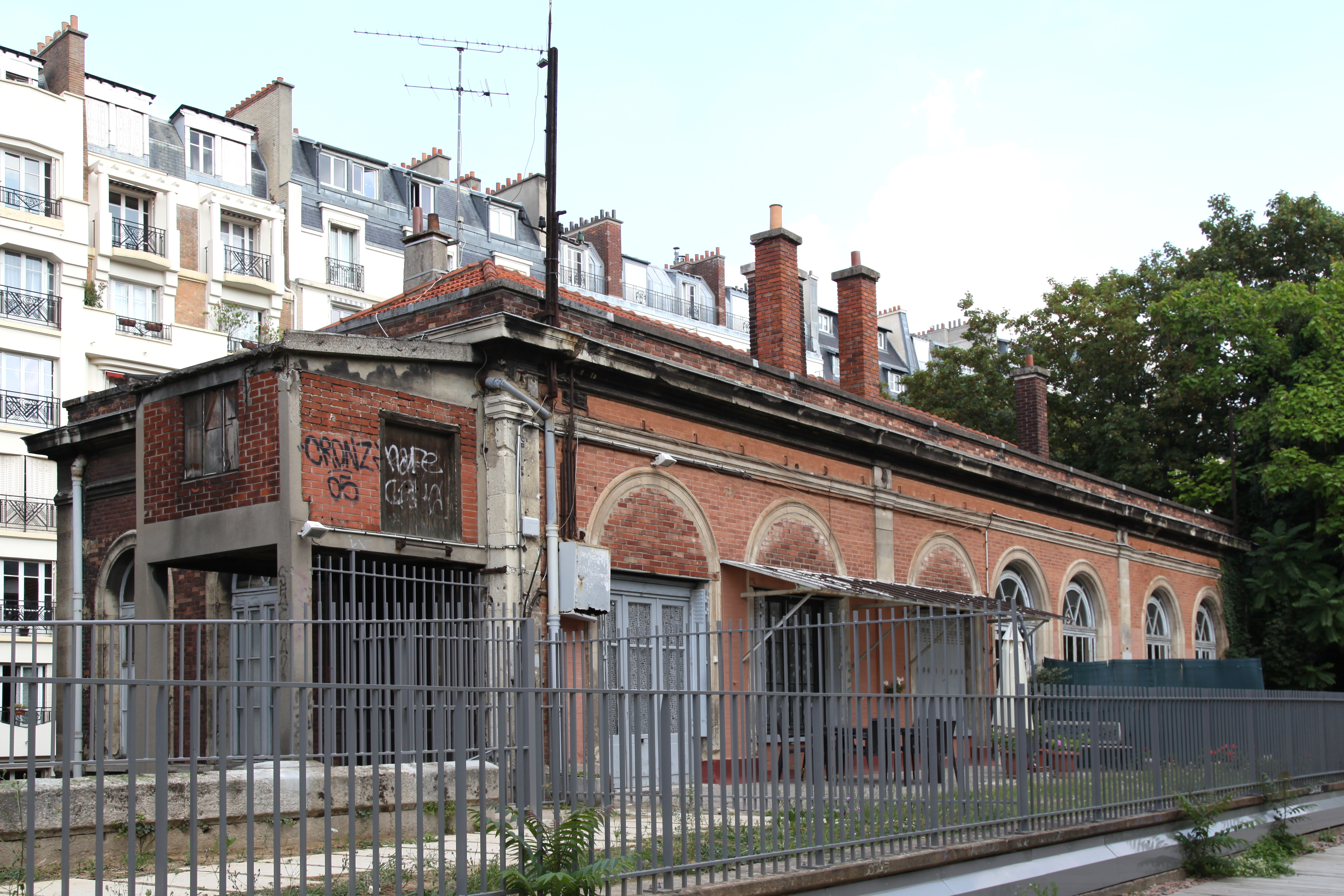 Le bâtiment de la gare de Vaugirard-Ceinture, vu depuis les voies.